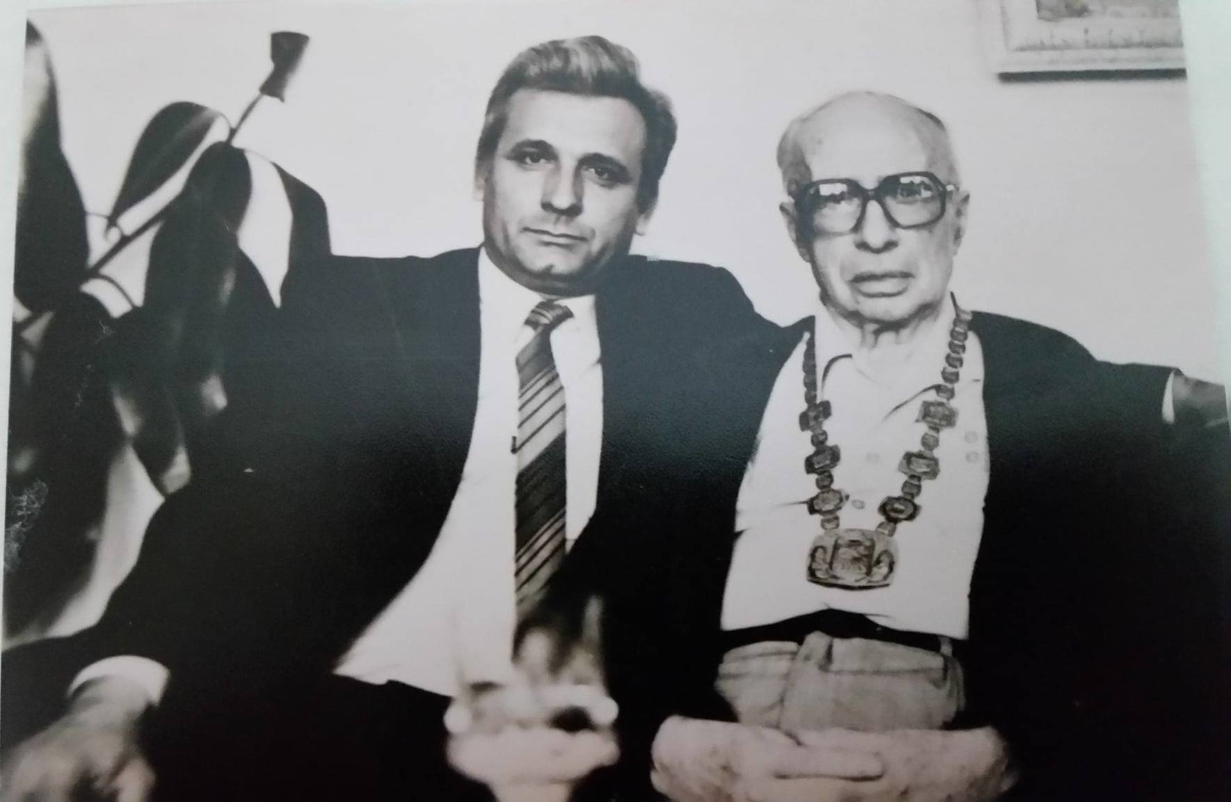 Снимка от удостояването на Йордан Капсамунов с Почитния знак „Гражданин на Стара Загора“. До него е тогавашния кмет Кольо Георгиев, 1986 г.